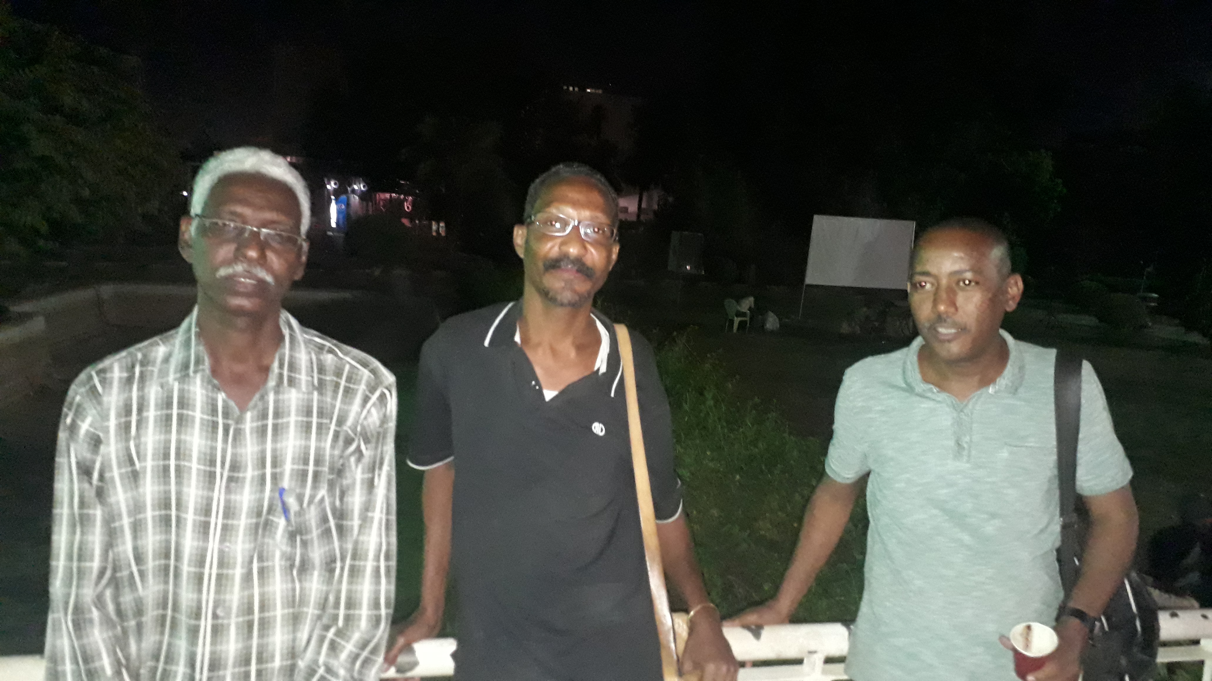 المؤسسين لجماعة عمل الثقافية